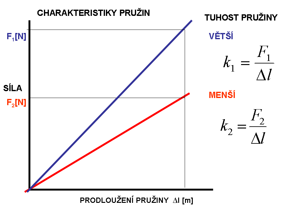 Diagram znázorňuje t.zv.charakteristiky pružin, což jsou přímky vyjadřující lineární závislost mezi silou působící na pružinu a její pružnou deformací. Sklon přímek udává tuhost pružin,což je síla potřebná k jednotkové deformaci pružiny.Diagram by měl doplnit stránku Pružiny. Diagram jsem nakreslil na svém PC dne 10.12.2008 Arctur